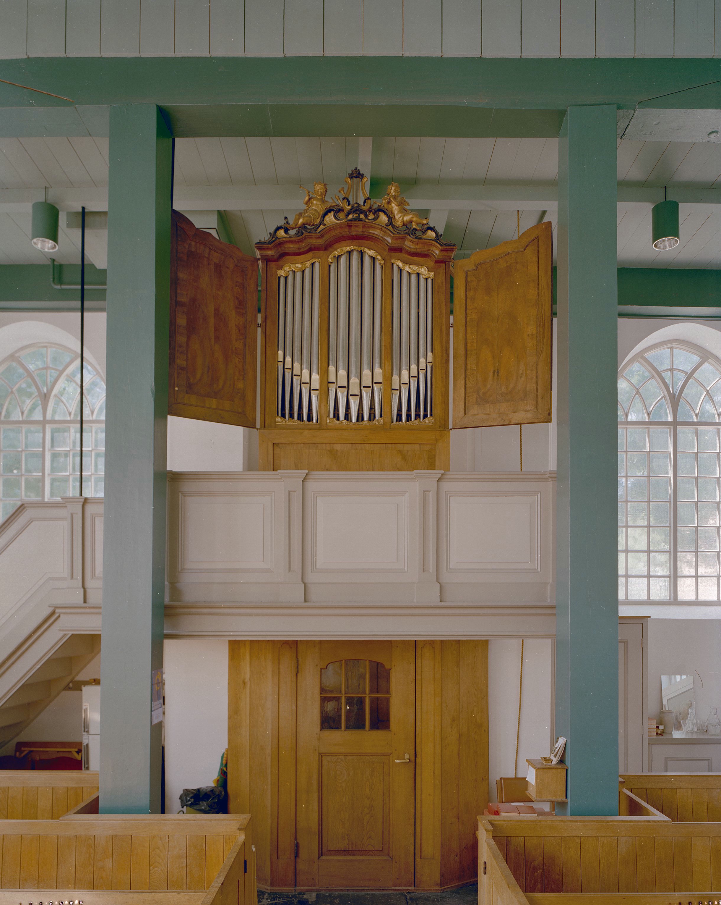 Nederlands Hervormde Kerk: Interieur, aanzicht orgel, orgelnummer 552 (opmerking: Gefotografeerd voor Het Historische Orgel in Nederland 1726-1769, bladzijder 181)